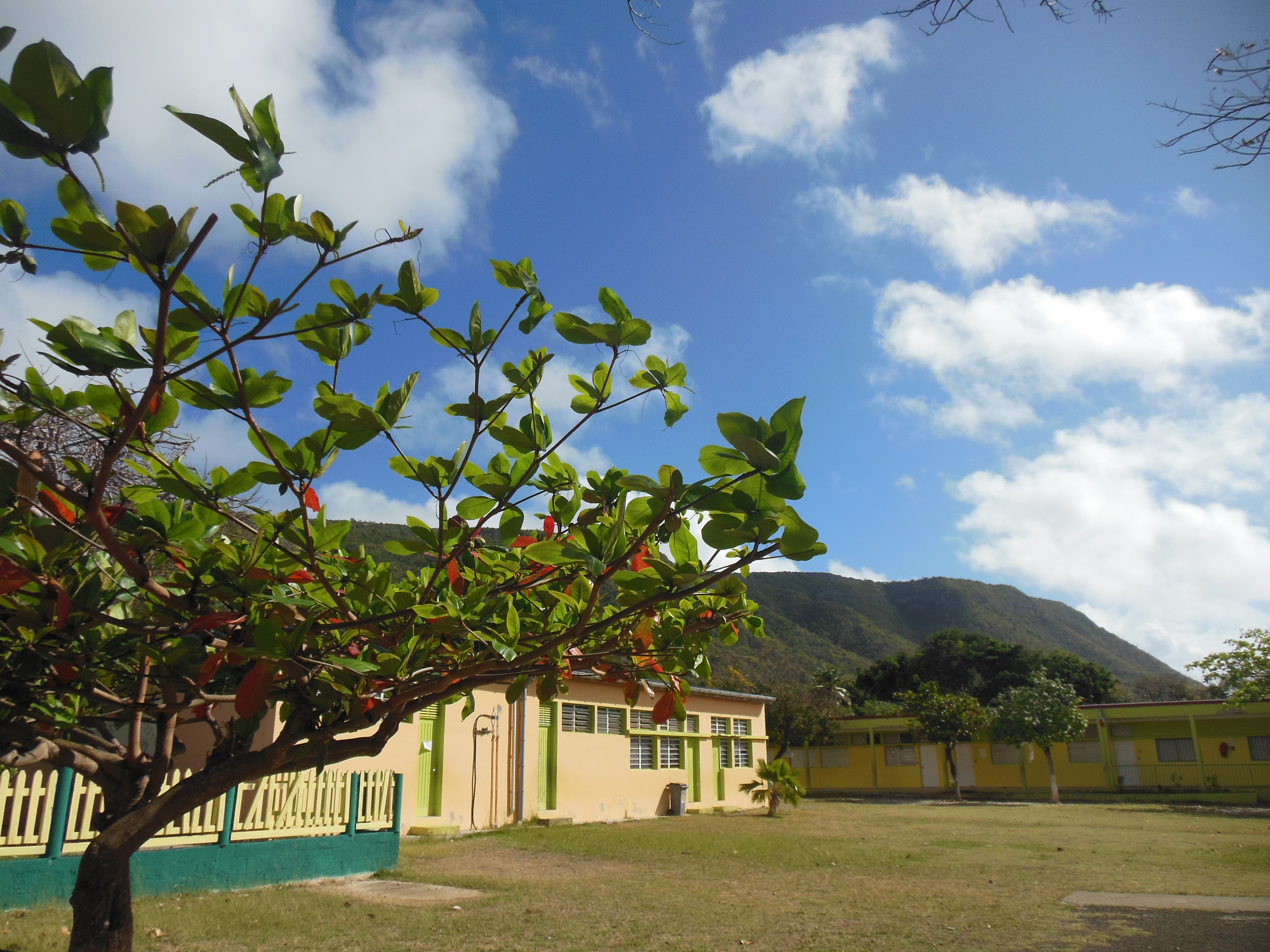 Ecole primaire publique laïque de La Désirade